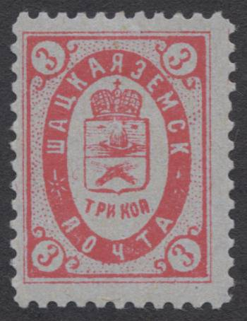 Земская марка. Шацкий уезд № 14 (1889 г.)